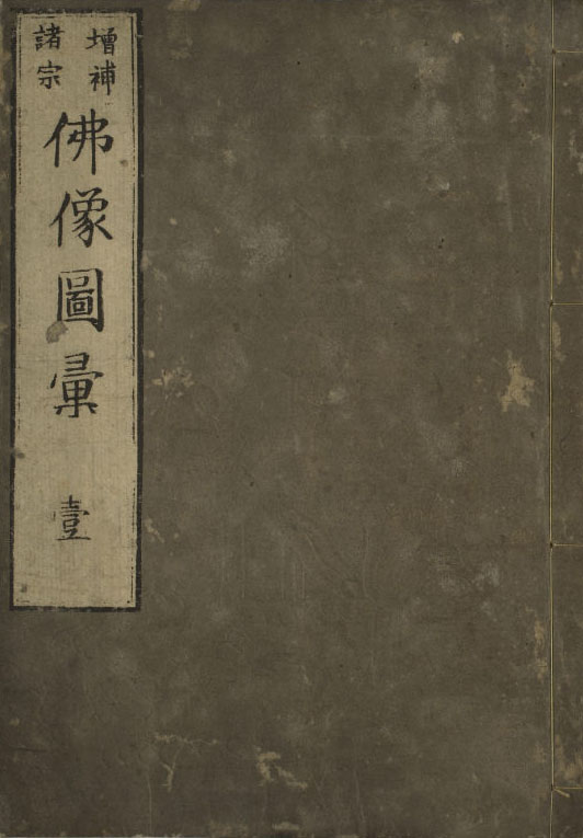 増補諸宗 仏像図彙 1783年 土佐秀信